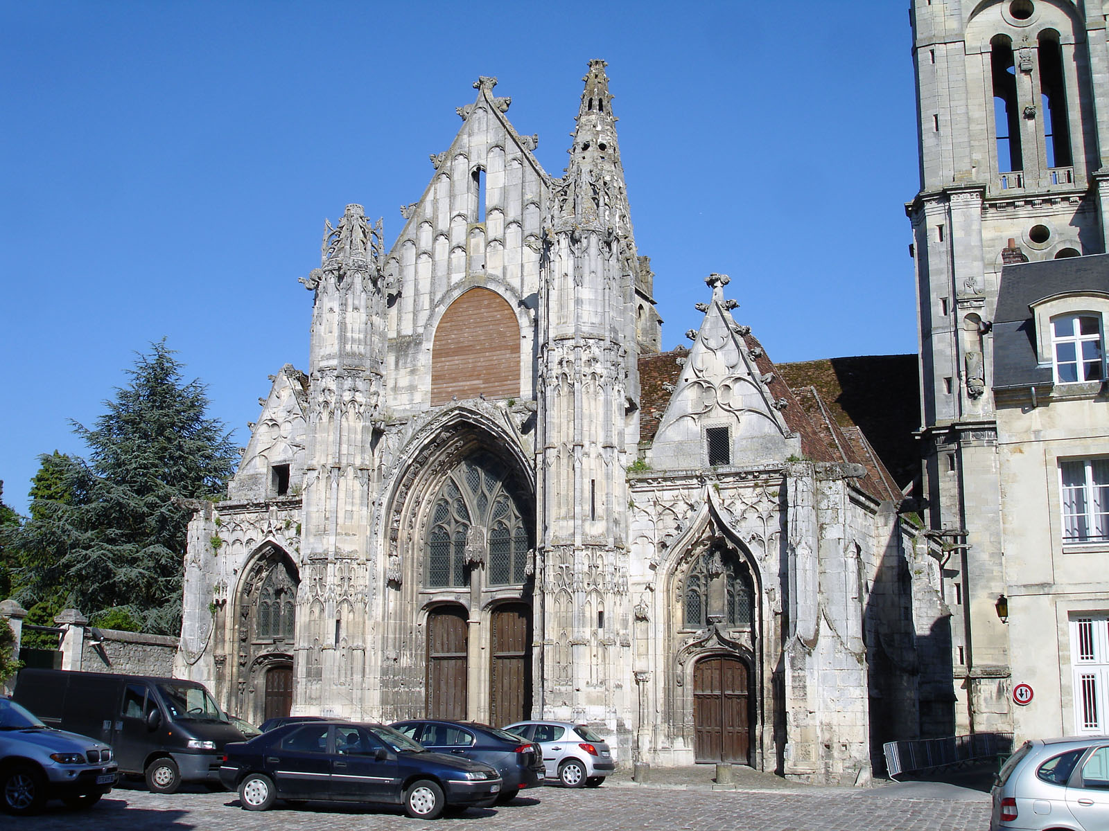 Façade de l'église Saint-Pierre à Senlis, Oise, France.